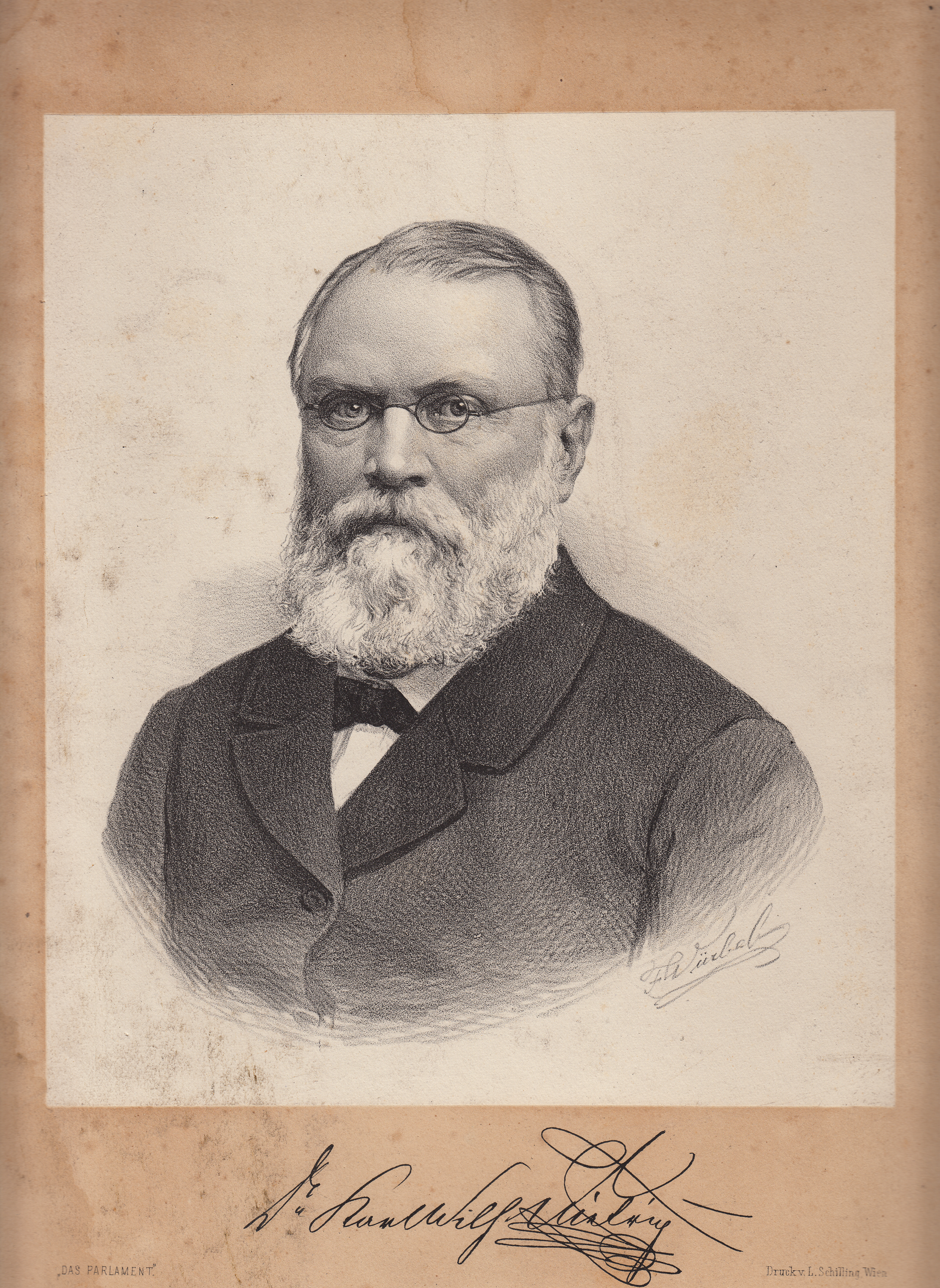 Abgebildet ist: Karl Wilhelm Ritter von Dietrich (1811-1889) Abgeordneter im schlesischen Landtag; Lithografie von Franz Würbel (1822–1900).